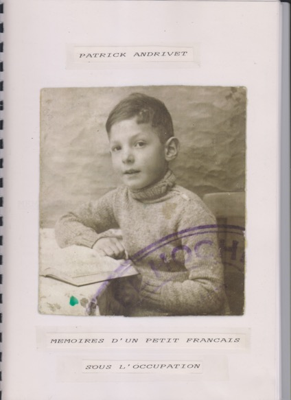 Photo Patrick Andrivet enfant